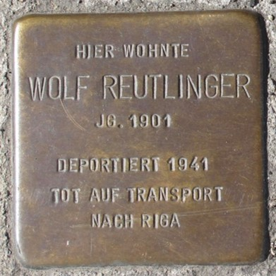 Deutschland (D) - Baden-Württemberg (BW) - Landkreis Esslingen (ES) - Kirchheim unter Teck: Stolperstein für 'Wolf Reutlinger'